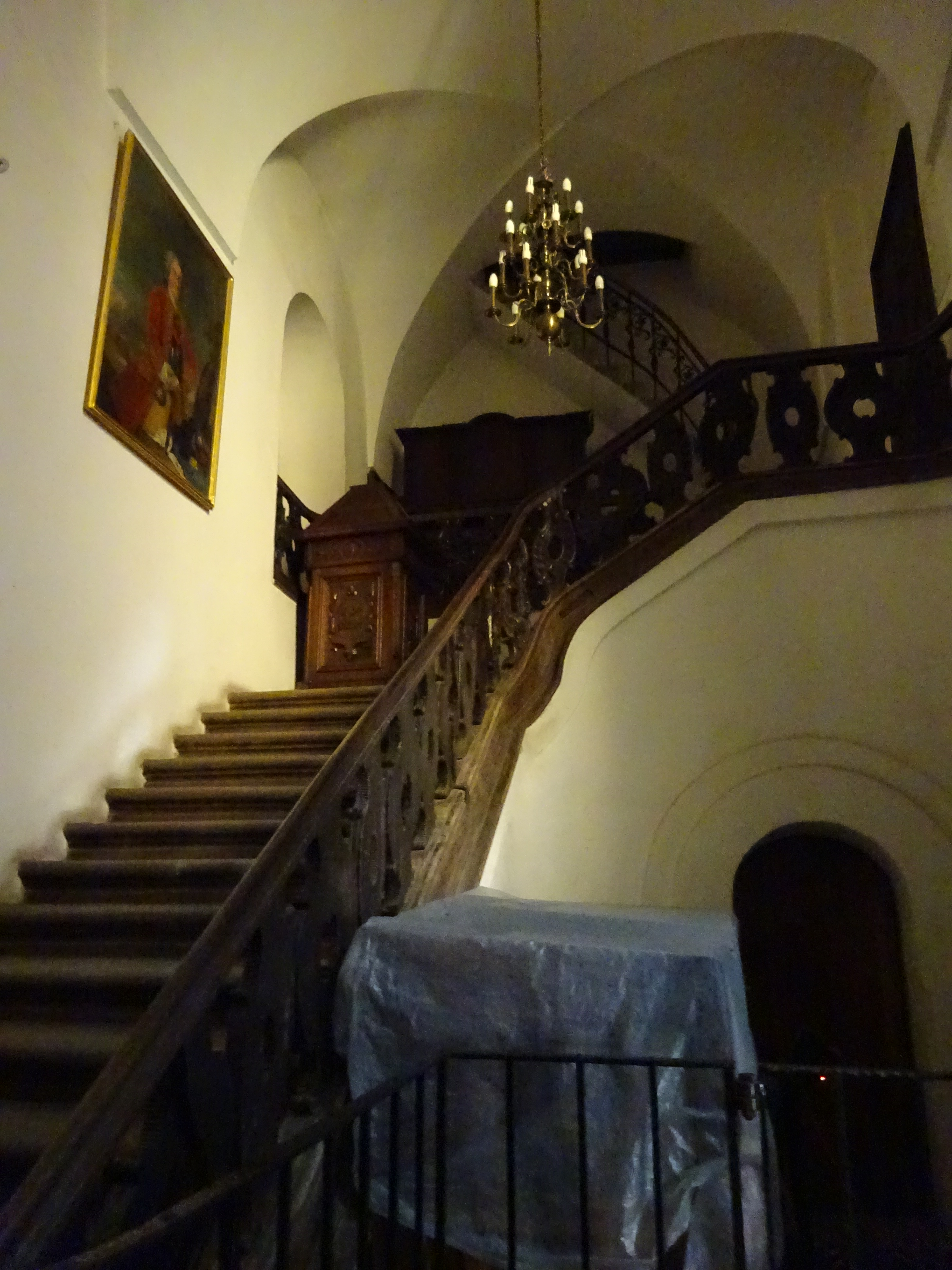 Schody do Kapitularza w Sieni Katedralnej na Wawelu. Kraków.